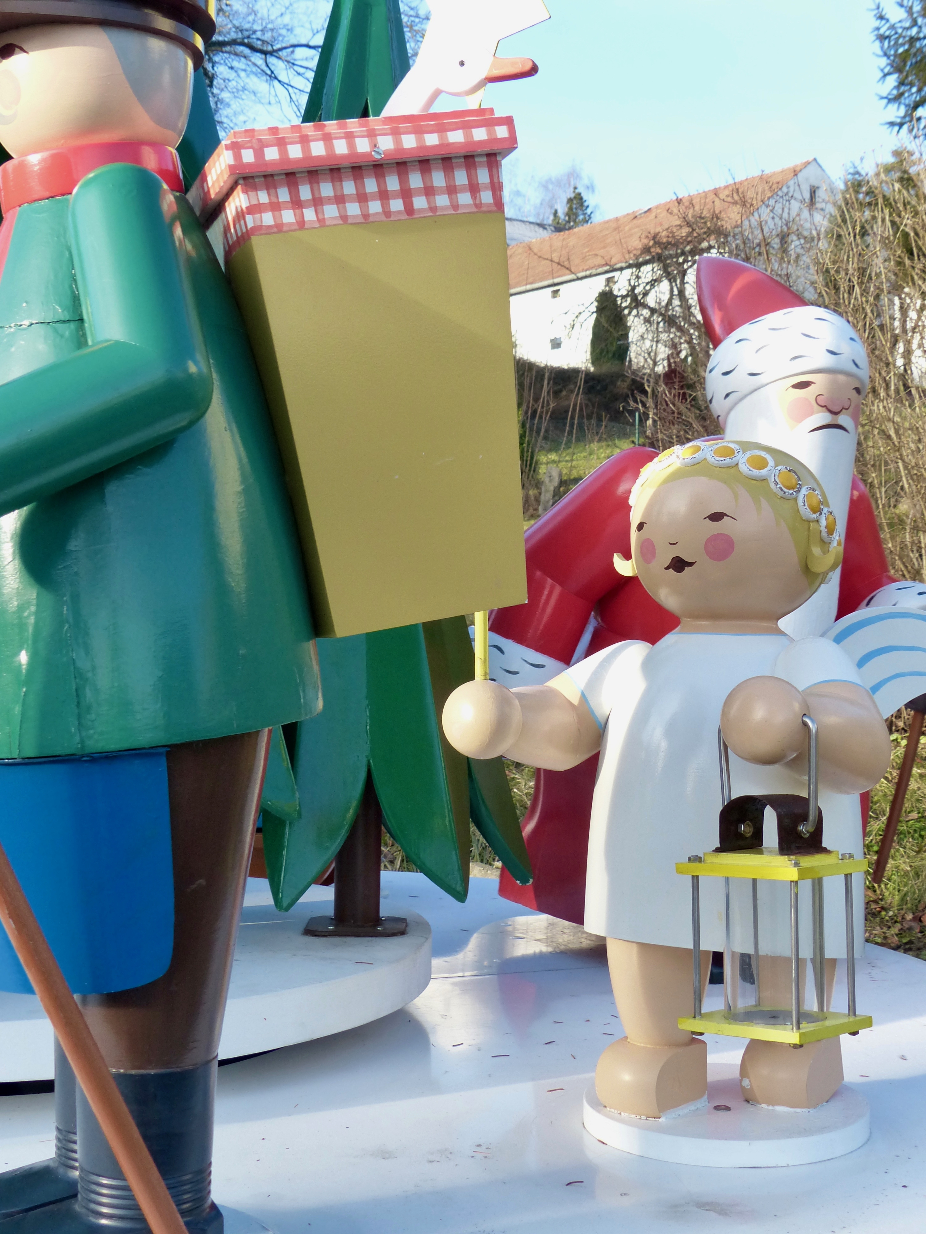 Übergroße Spieldose mit Wendt & Kühn-Figuren im Ortszentrum von Grünhainichen